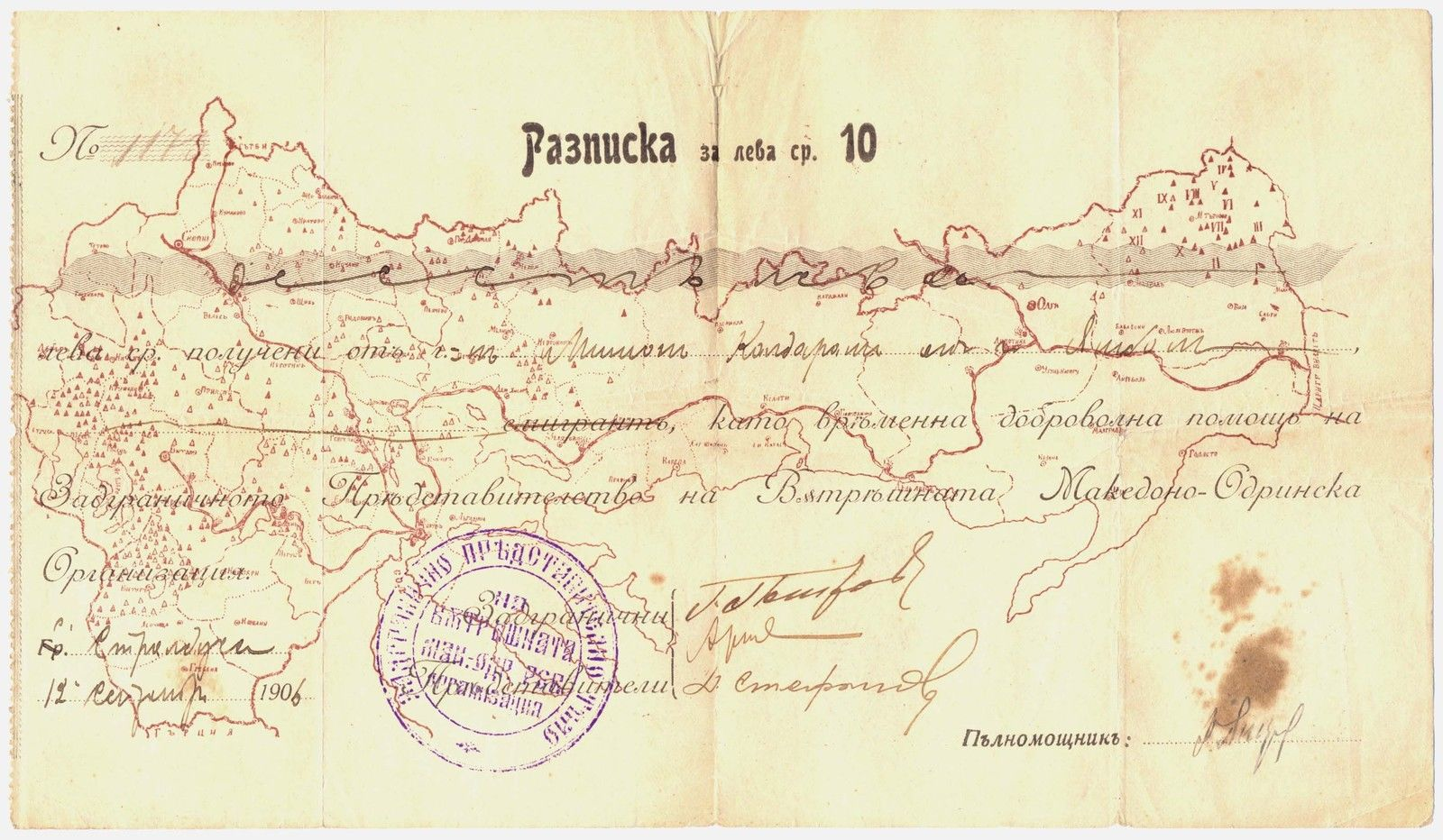 Разписка на Задграничното представителство на ВМОРО за пари от 1906 година с подписите на задграничните представители Гьорче Петров, Петър Попарсов и Димитър Стефанов.